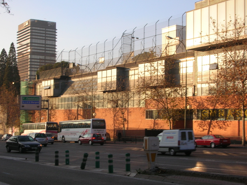 Exterior del Colegio de Maravillas The Exterior of the Maravillas College Gynamsium by Alejandro de la Sota in Madrid